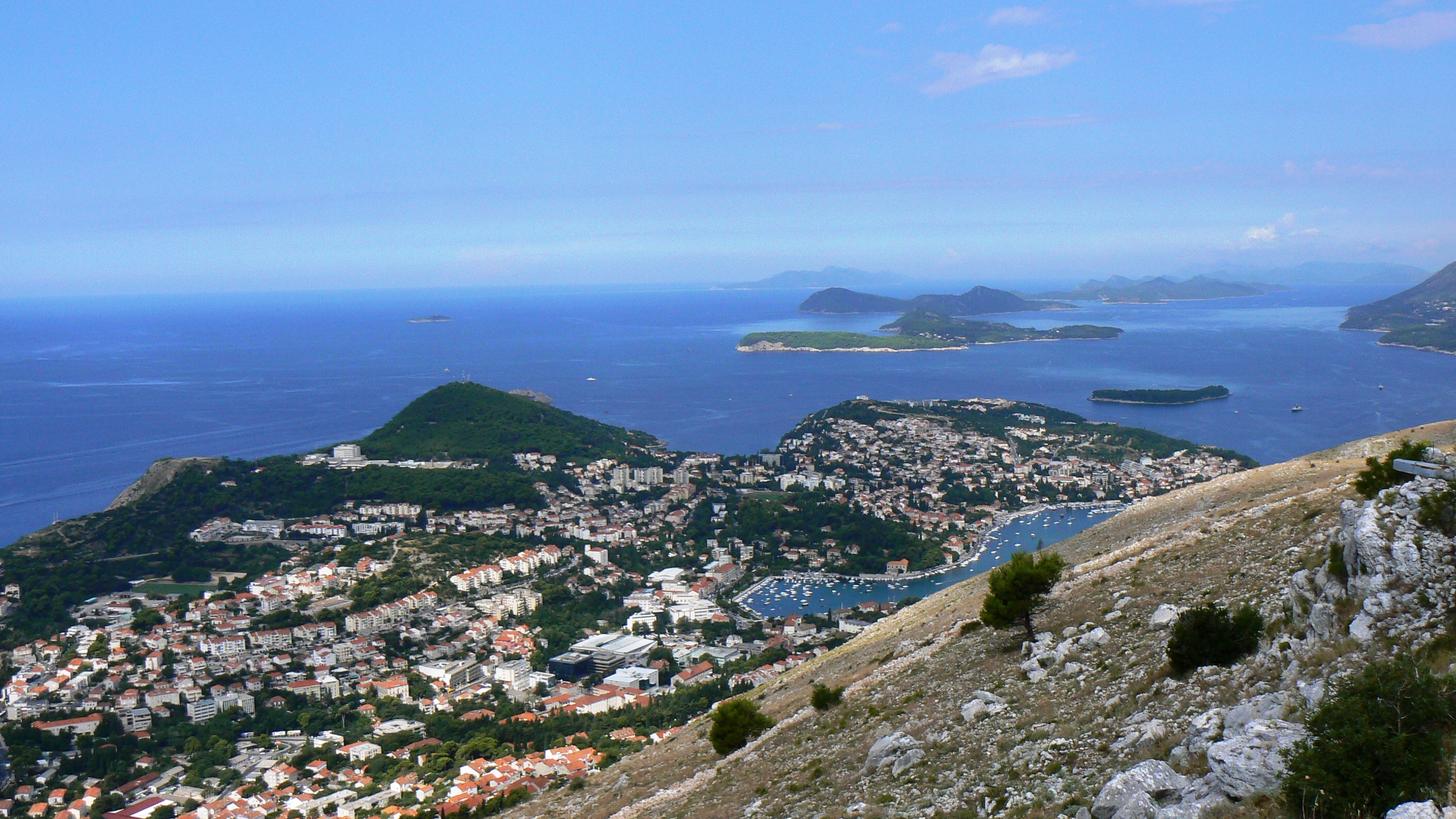 Els afores de Dubrovnik.